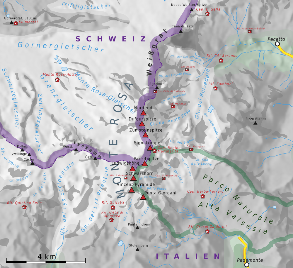 Übersichtskarte des Monte Rosa Massiv.